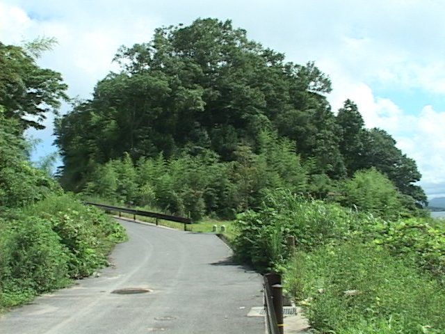 Tsudsurao castle Sannomaru,Tottori-city